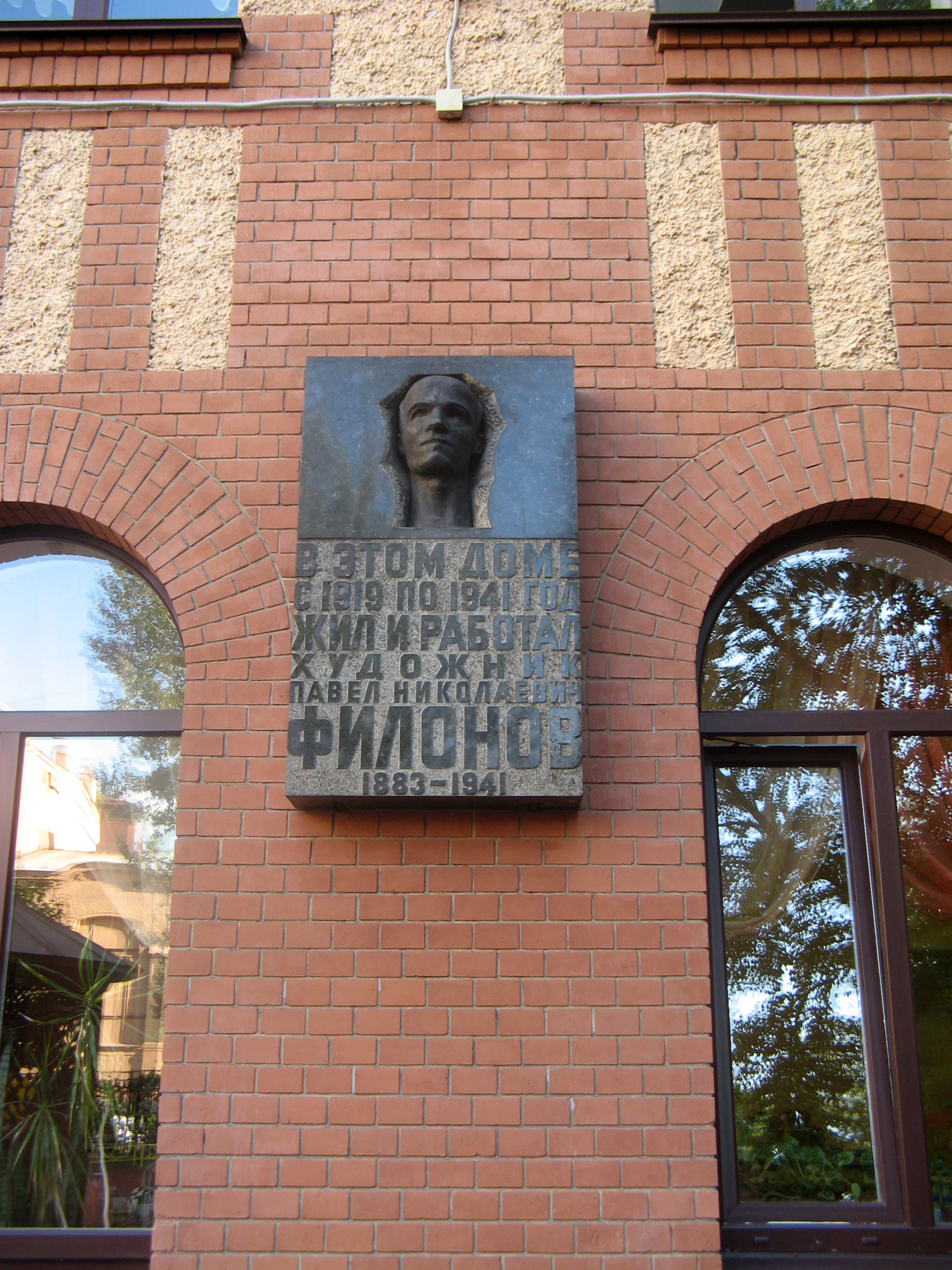 Дом писателей имени В.Ф. Голубева (общежитие для нуждающихся литераторов), в котором жили революционер Г.А. Лопатин, писатель А.П. Чапыгин, художник П.В. Филонов и др.: улица Литераторов, 19/10 (19А), Петроградский район, Санкт-Петербург